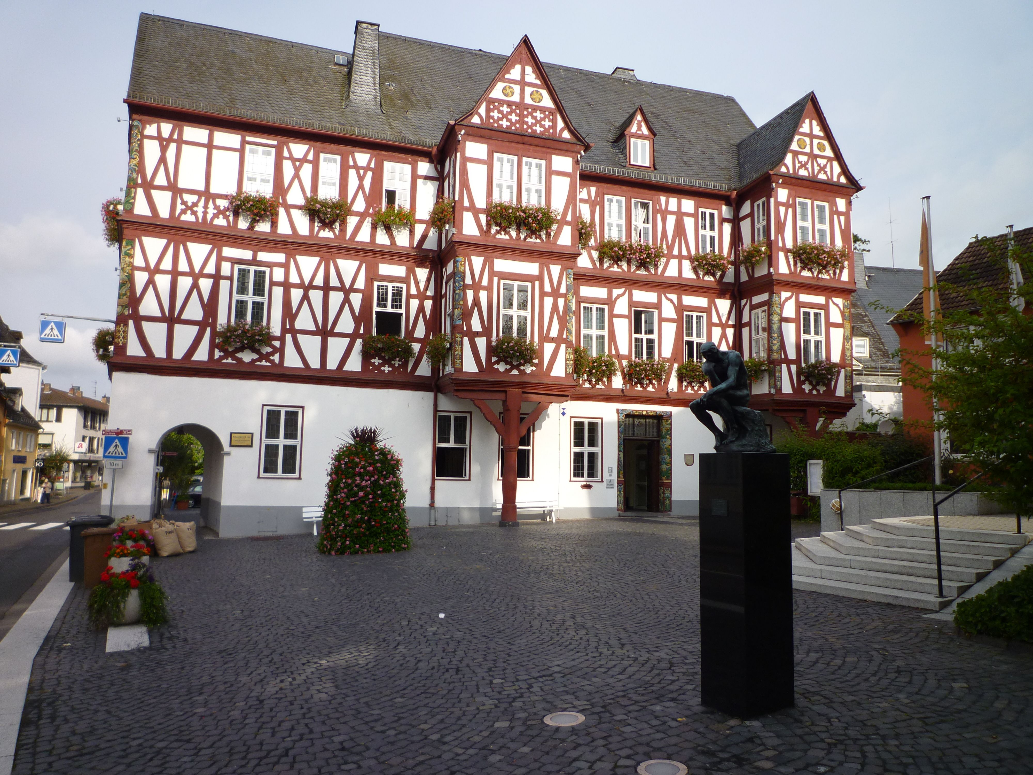 Nassau an der Lahn - Fachwerk-Rathaus.jpg